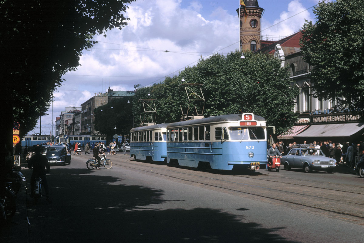 Spårvagn på Östra Hamngatan i Göteborg 1963 Gamla Arkaden i bakgrunden Photograph by: Trapp, Håkan